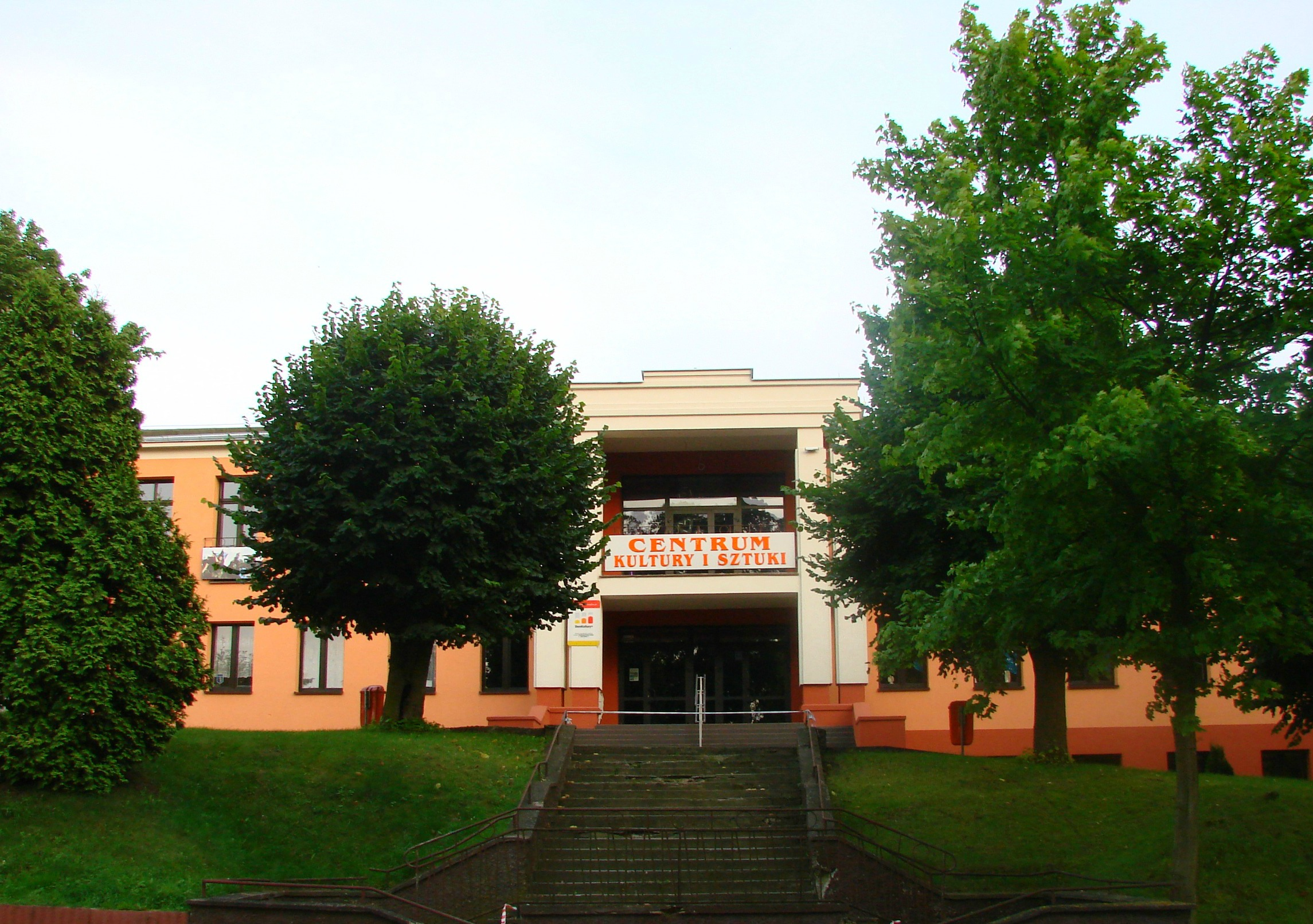 Centrum Kultury i Sztuki; Kino, na Starym Mieście; przy ul. T. Kościuszki. Obiect in Sępólno Krajeńskie, Poland.